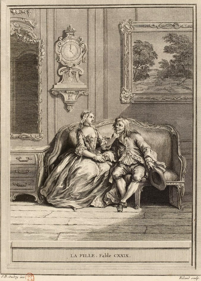 Gravure réalisée par Ryland d'après un dessin de Jean-Baptiste Oudry représentant la fable La fille de Jean de La Fontaine (fable 4 du livre VII). Cette gravure est parue dans l'édition complète des fables de La Fontaine, parue en quatre tomes chez l'éditeur Desaint & Saillant, rue saint Jean de Beauvais à Paris, 1755-1759.